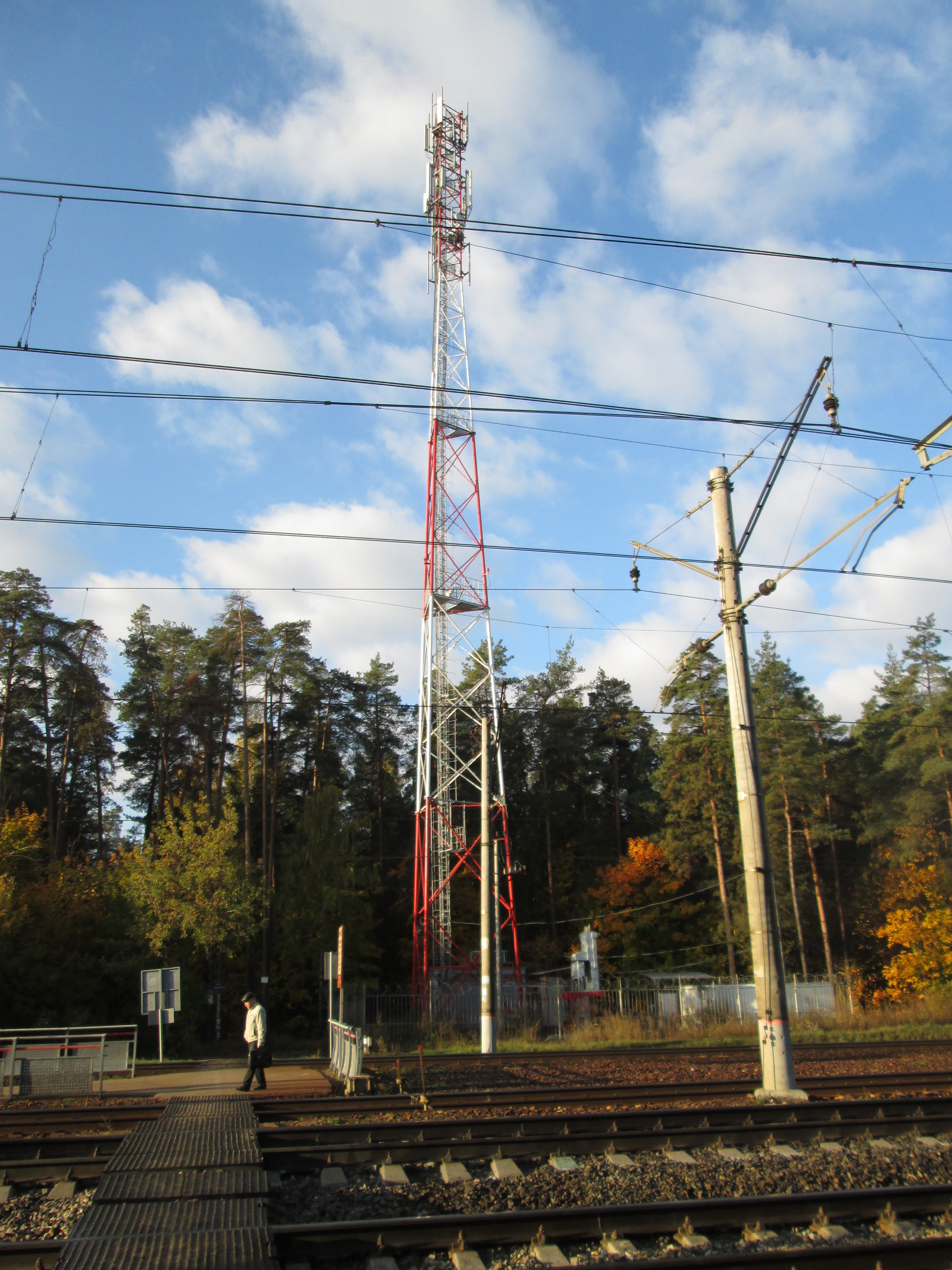 Башня связи